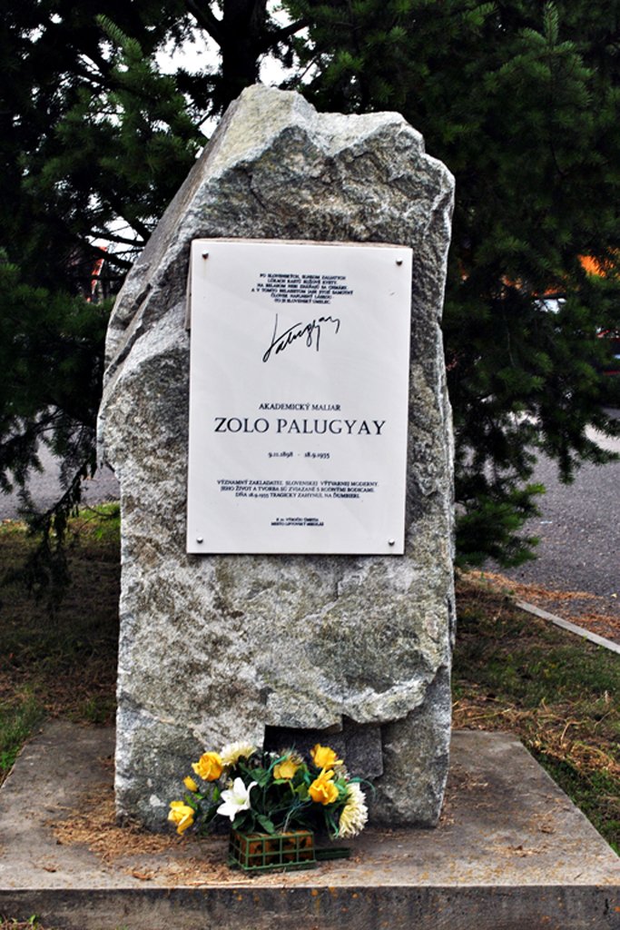 Pamätník venovaný zakladateľovi slovenskej moderny akademickému maliarovi Zolovi Palugyayovi v rodných Bodiciach